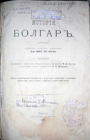 "История на българите" на Константин Иречек.